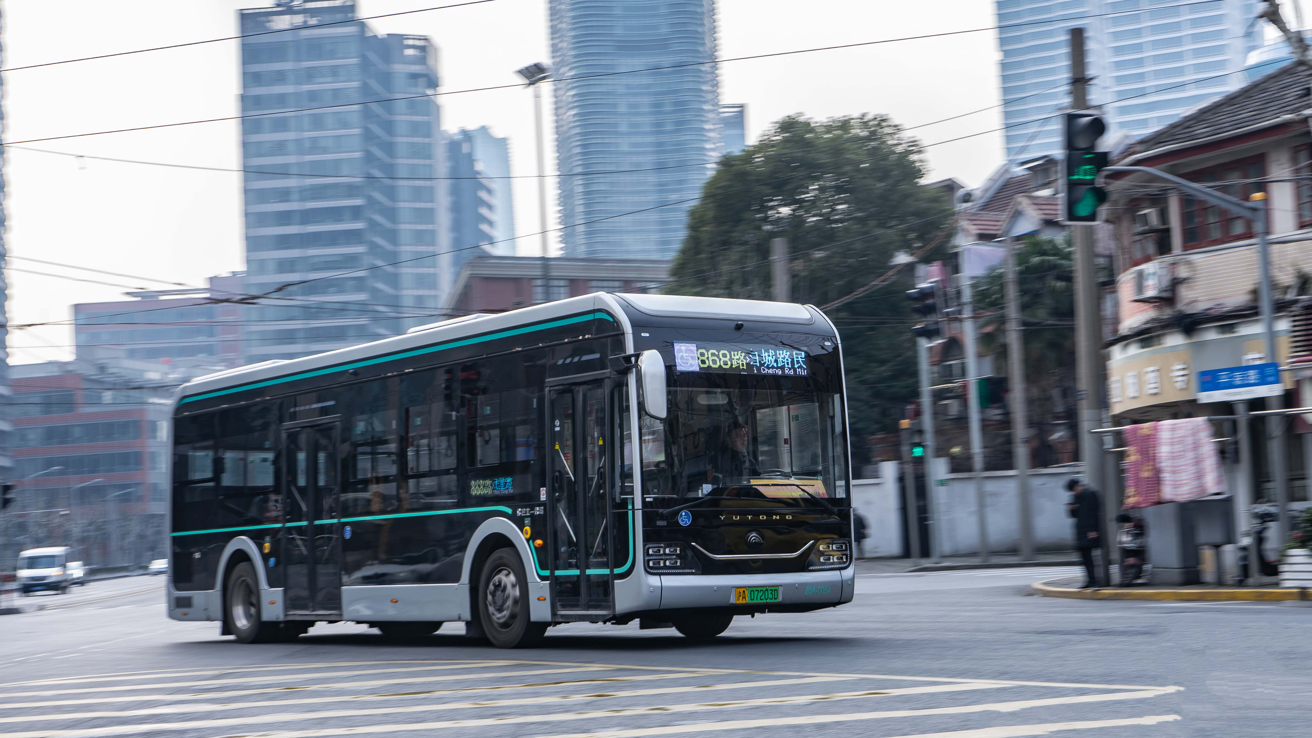 868路Z0A-0054，摄于平凉路临潼路。